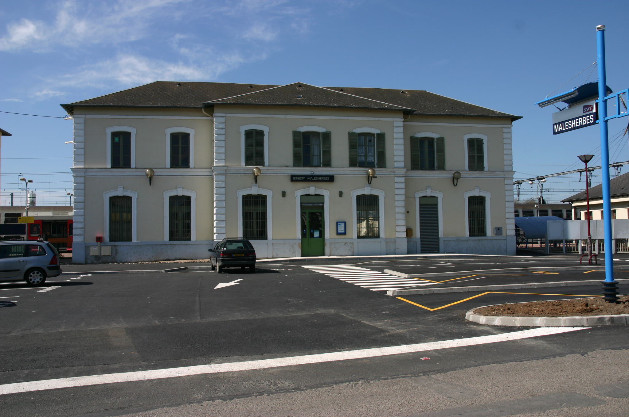 Gare de Malesherbes, Loiret (France)